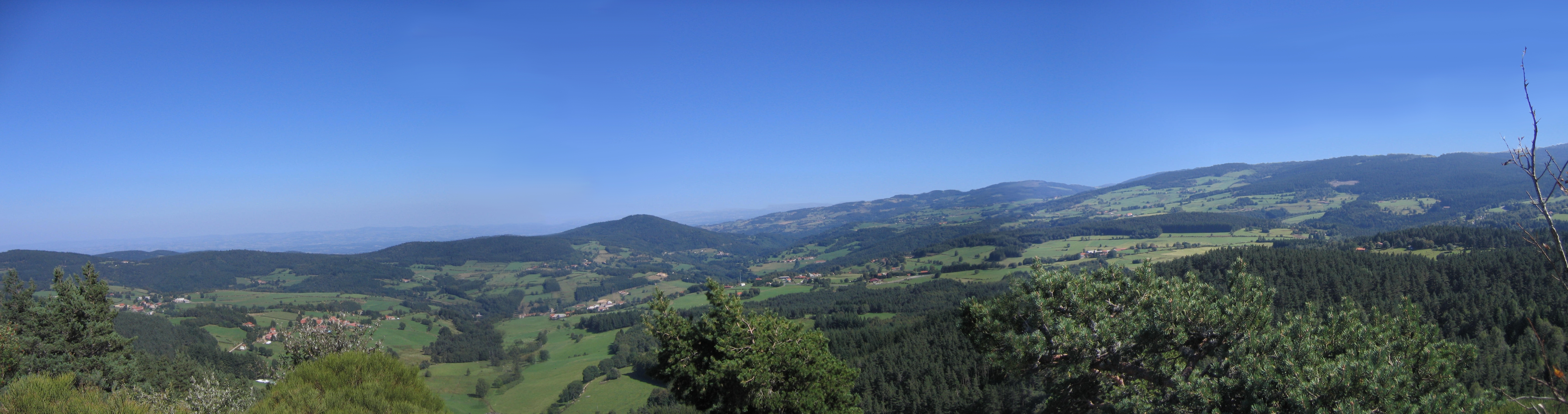 Panorama forézien vu depuis le rocher de l'Olme (commune de Chalmazel)